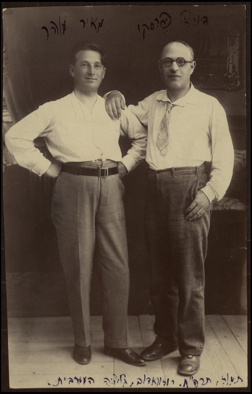 הדפס כסף מתצלום שחור לבן שבו נראה הסופר העברי דניאל פרסקי (מימין) לצד המשורר מאיר מוהר. על התצלום כתב פרסקי את שמות המצולמים וציין בתחתיתו: "תמוז, תרפ"ח. רוזוואדוב, גליציה המערבית". תצלום זה נעשה בעת שהגיע פרסקי לביקור בפולין מארצות הברית, בקיץ 1928. תצלום זה נתרם לספרייה הלאומית בשנת 1940 על ידי דניאל פרסקי עצמו.